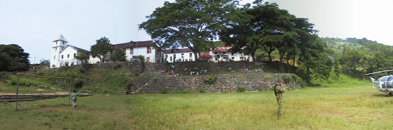 Colégio in Soibada